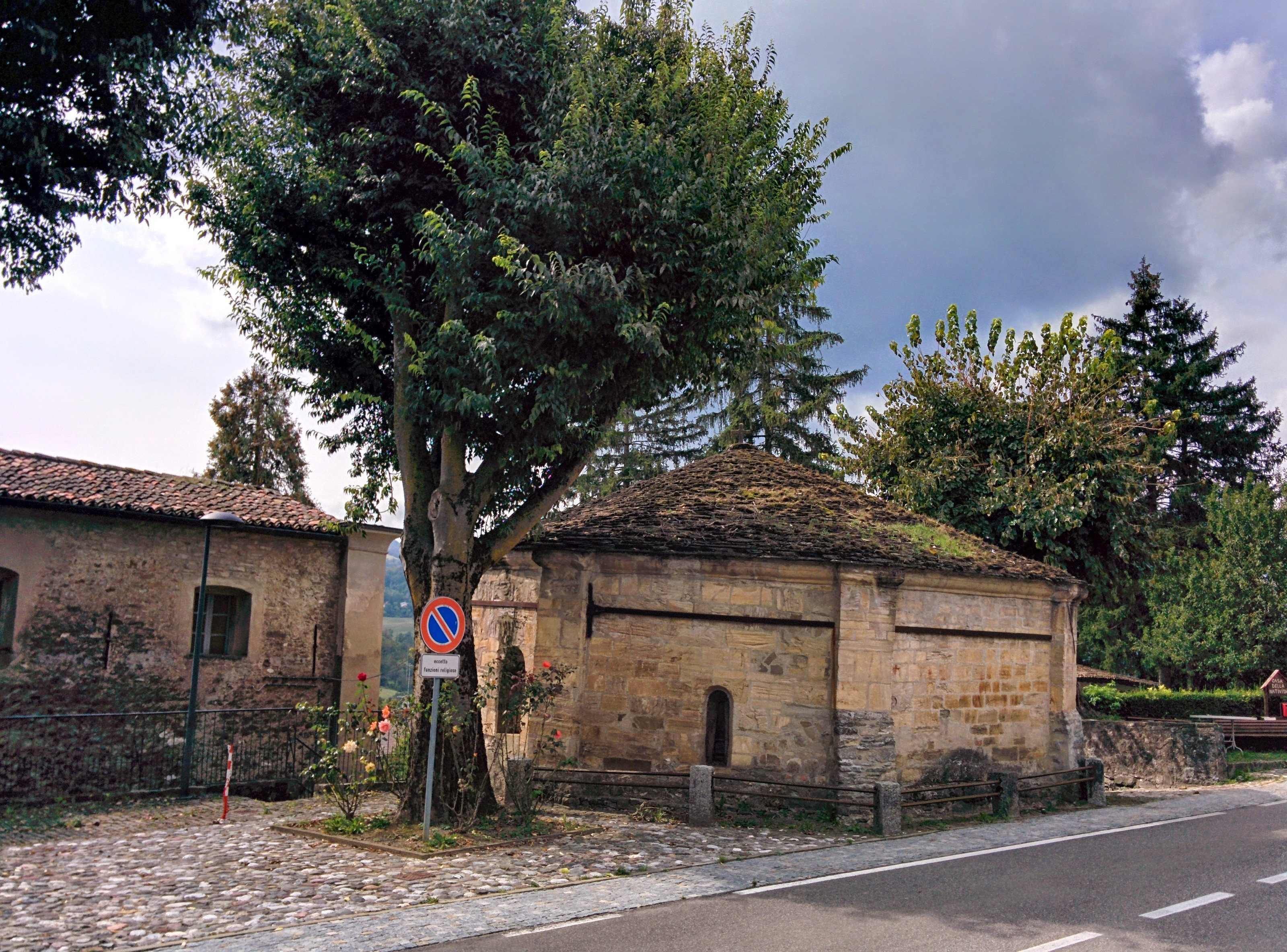 Battistero This is a photo of a monument which is part of cultural heritage of Italy.